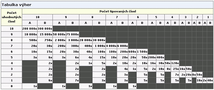 Tabulka výher loterie Šťastných 10